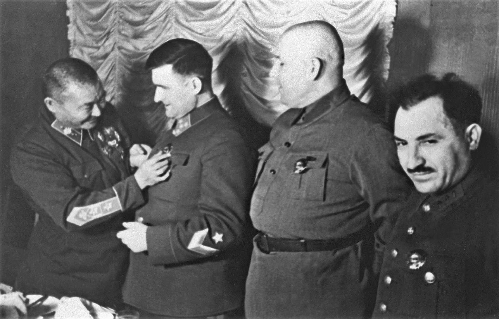 Церемония вручения орденов Красного Знамени Монгольской Народной Республики. Слева направо: маршал МНР Х. Чойбалсан, начальник штаба Западного фронта генерал-полковник В.Д. Соколовский, заместитель Председателя Президиума Верховного Совета СССР И.С. Хохлов и заместитель начальника Управления Особых отделов НКВД СССР комиссар государственной безопасности 3-го ранга Л.Ф. Цанава